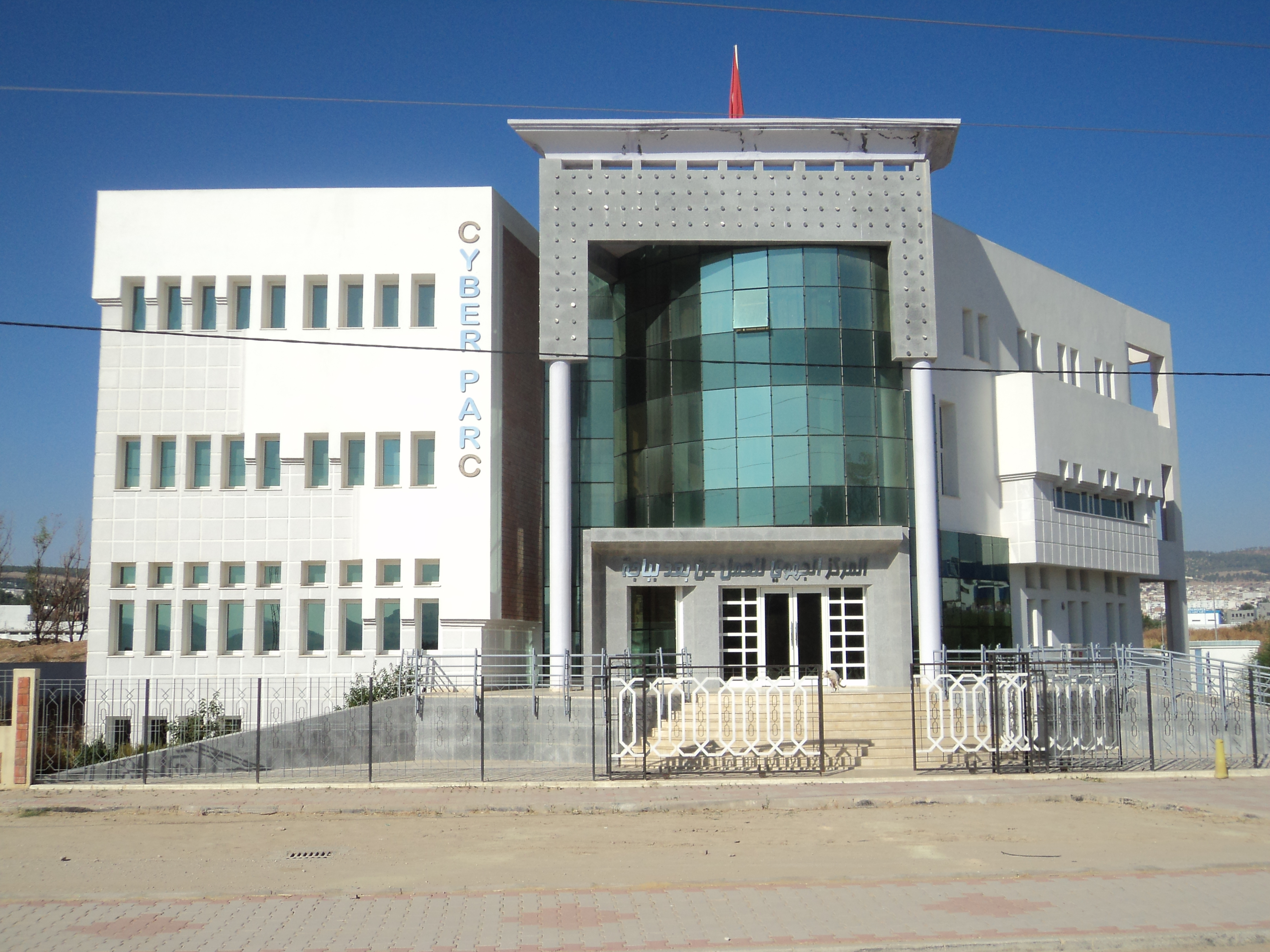 Cyber parc de Béja